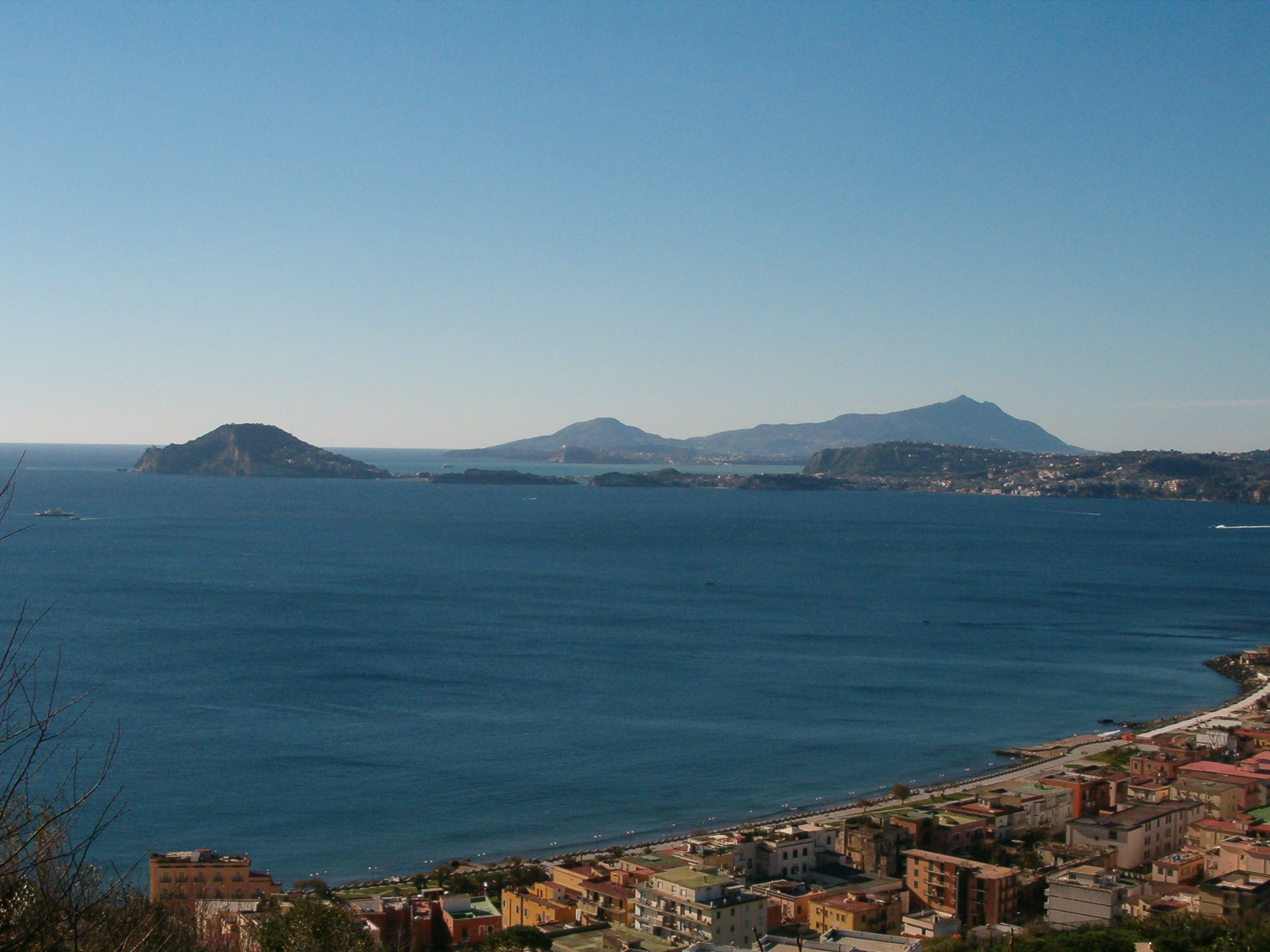 Campi Flegrei: Golfo di Pozzuoli visto da Pozzuoli (in primo piano), racchiuso da Capo Miseno e dalla costa di Bacoli e di Baia. Sullo sfondo le isole di Procida e di Ischia (la più alta, con il Monte Epomeo).